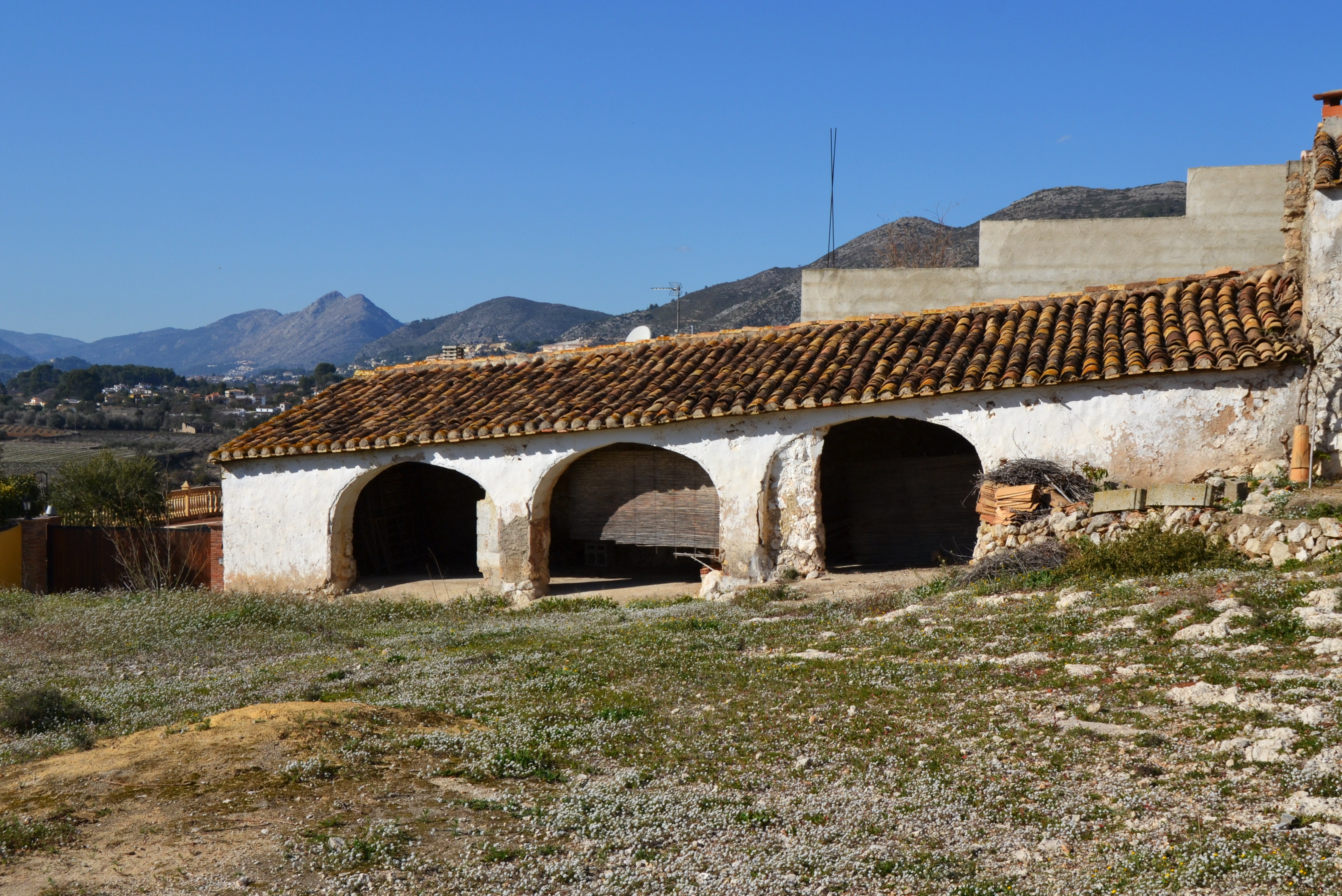 Riurau pel carrer la Lluna, Llíber.